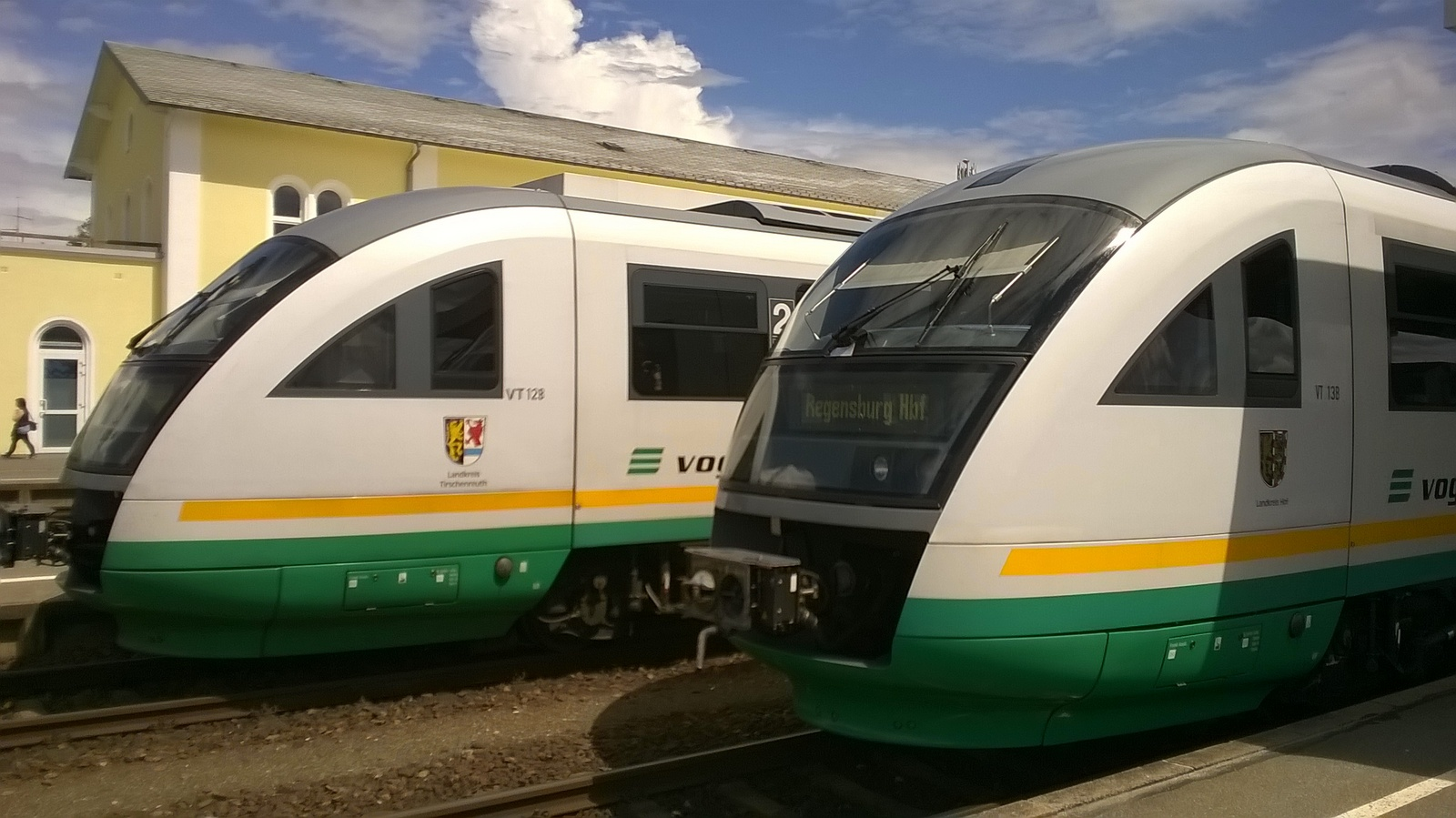 Siemens Desiro Triebwagen VT12B und VT13B der Vogtlandbahn in Schwandorf